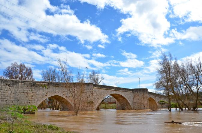 Puente Romano de Puente Duero